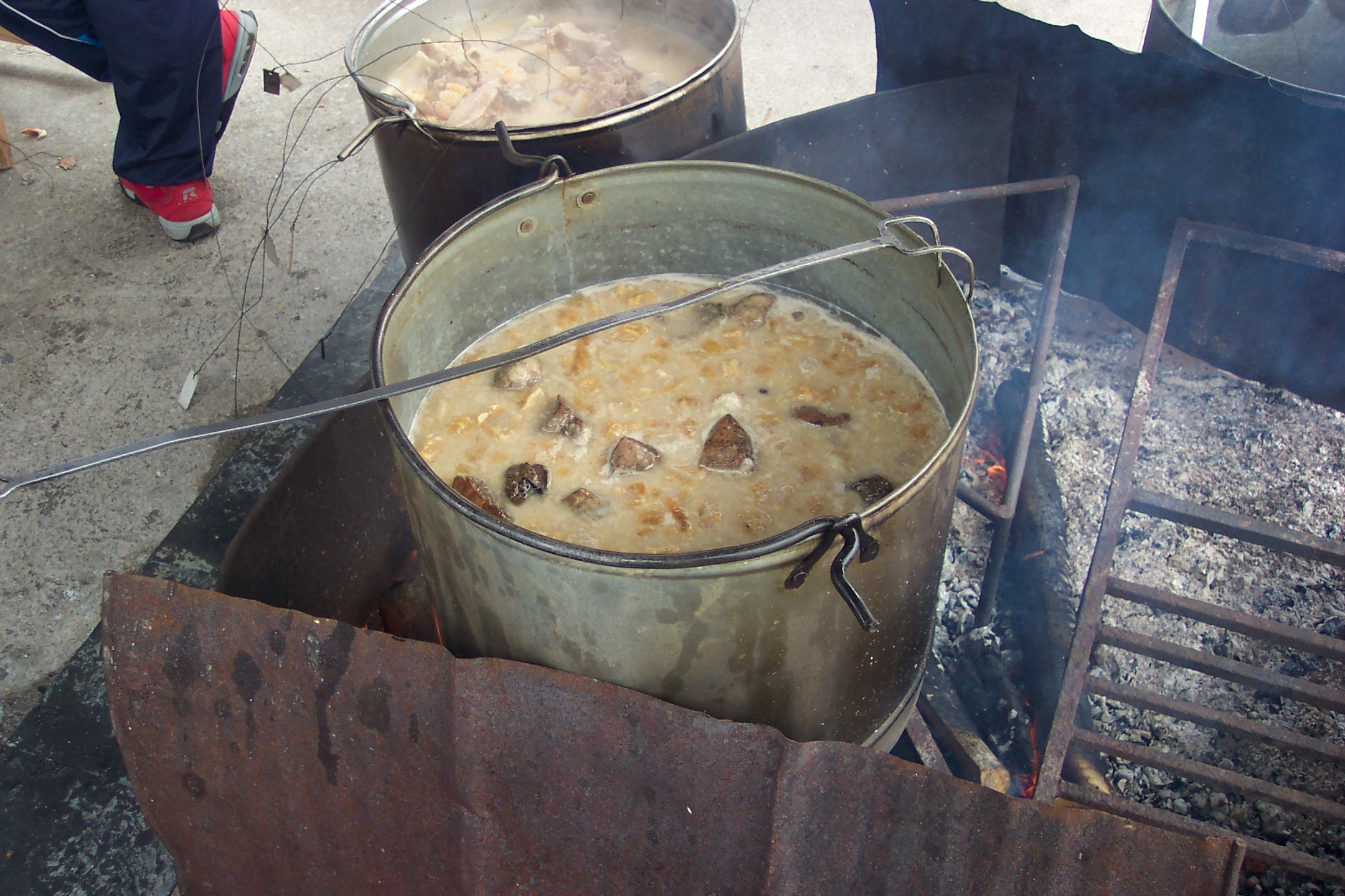 Carne ao caldeiro na feira de Castro, en Carballedo